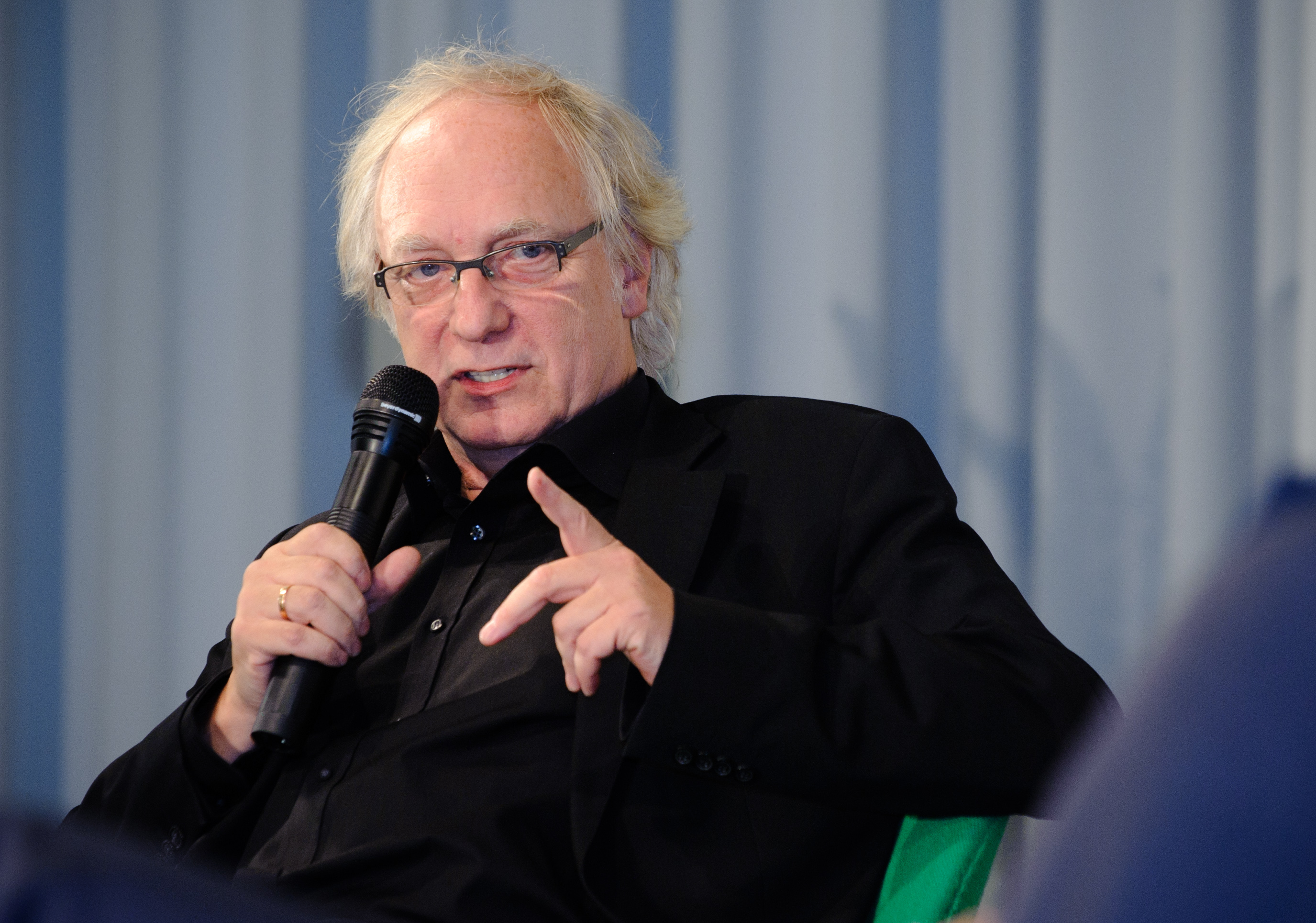 Foto: CC-BY-SA Stephan Röhl Die Bilder enstanden bei der Veranstaltung: "Ü30! Die Grünen vor neuen Herausforderungen" 30 Jahre Grüne. Die einst kleine Ökopartei ist zu einer festen Größe in der politischen Landschaft geworden. Ökologie, nachhaltiges Wirtschaften, Umweltschutz, erneuerbare Energien und Gleichstellung sind im gesellschaftlichen Mainstream angekommen. Sie werden deshalb auch von anderen Parteien aufgegriffen. Selbst sind die Grünen im Stimmungshoch, nicht nur in der Hauptstadt. Wie können sie dieses inhaltlich und programmatisch ausfüllen? Die Heinrich-Böll-Stiftung bringt führende Grüne mit herausragenden Gästen aus Kultur, Wissenschaft, Unternehmen und Gewerkschaften zusammen, um der Partei einen Spiegel vorzuhalten und gemeinsam darüber zu reden, welches die großen grünen Themen der nächsten zehn Jahre sind.